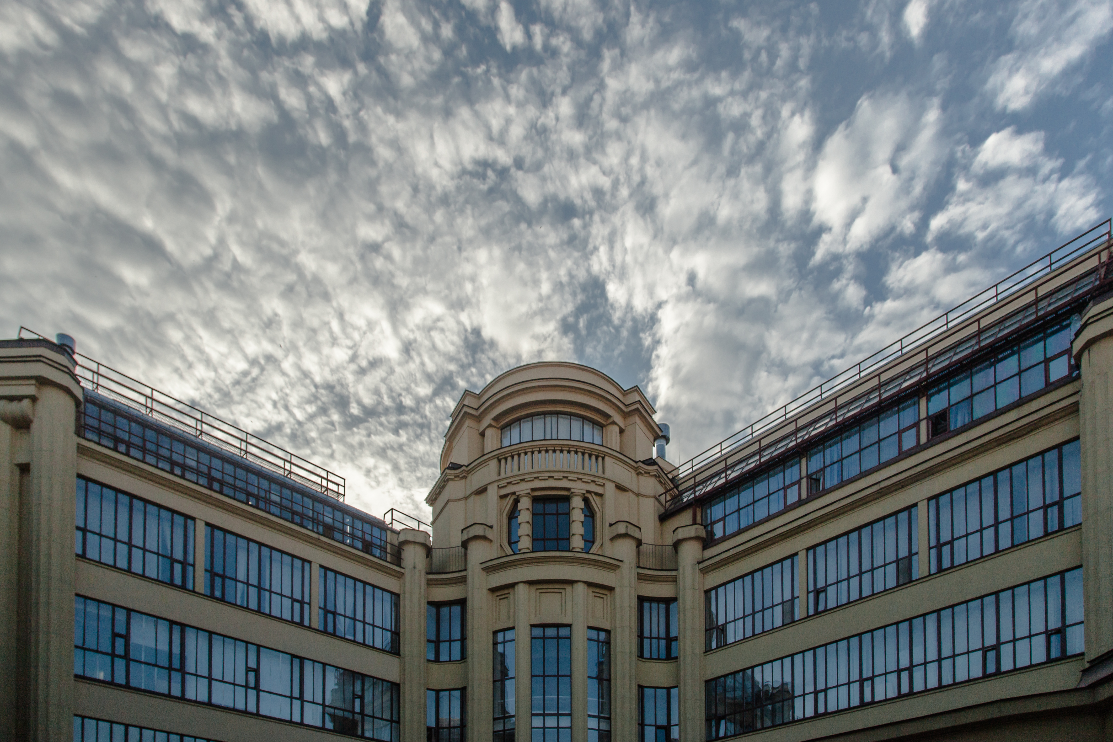 Второй корпус МАРХИ (Рождественка, 11/4 корпус 1 строение 4 - фактически же выходит в Сандуновский переулок) - вид изнутри квартала.